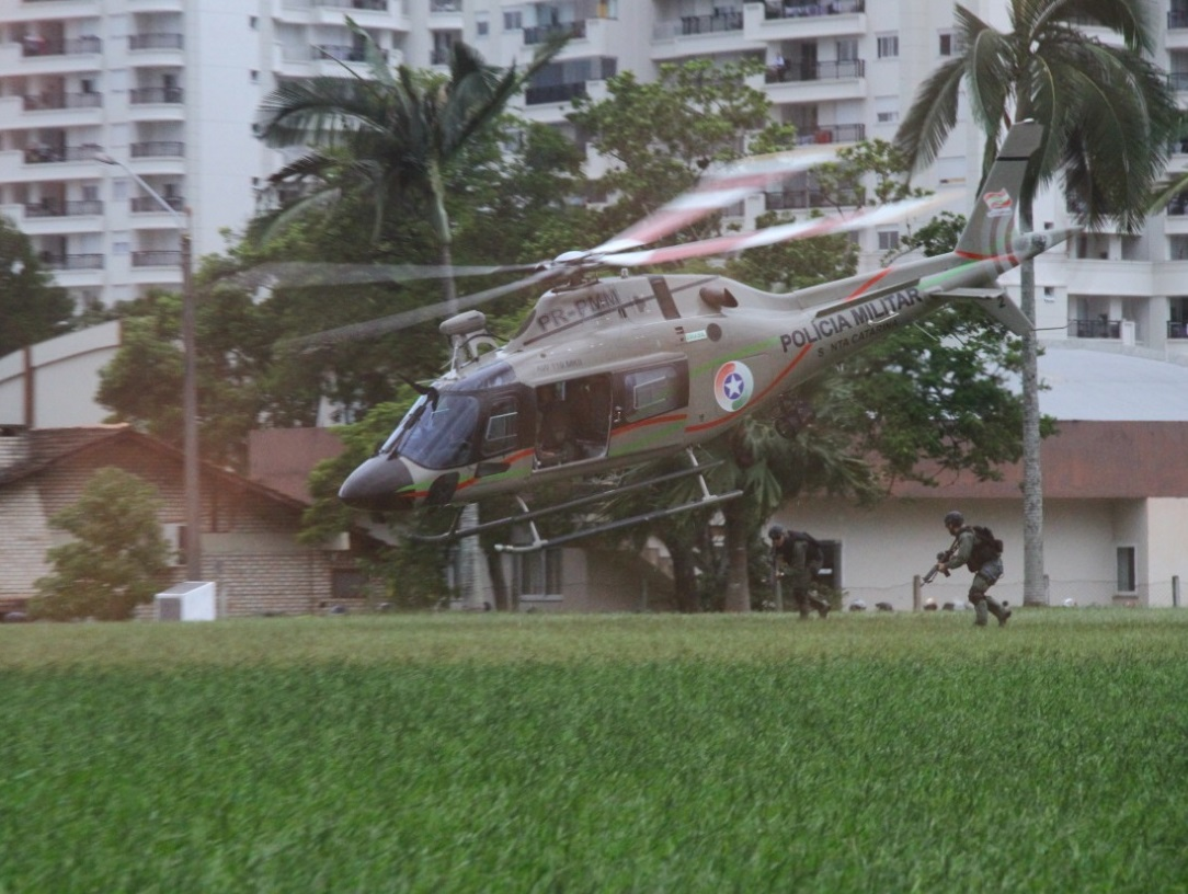 Foto oficial PMSC